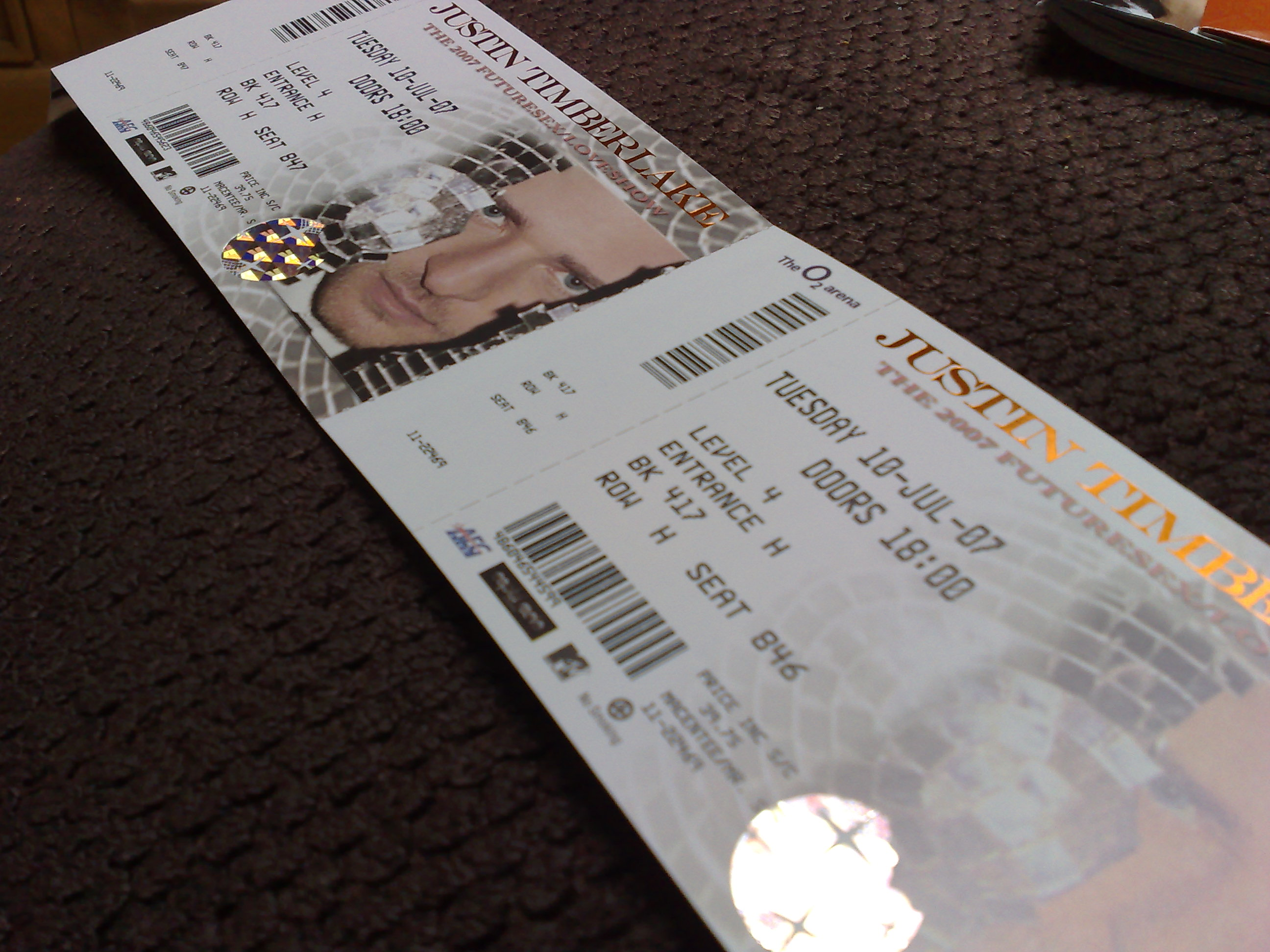 Un boleto para el concierto que Justin Timberlake ofreció en Londres, Inglaterra, el 10 de julio de 2007, como parte de su gira musical FutureSex/LoveShow.